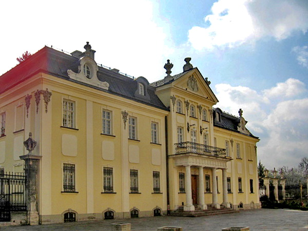 Metropolitan Palace, Lviv